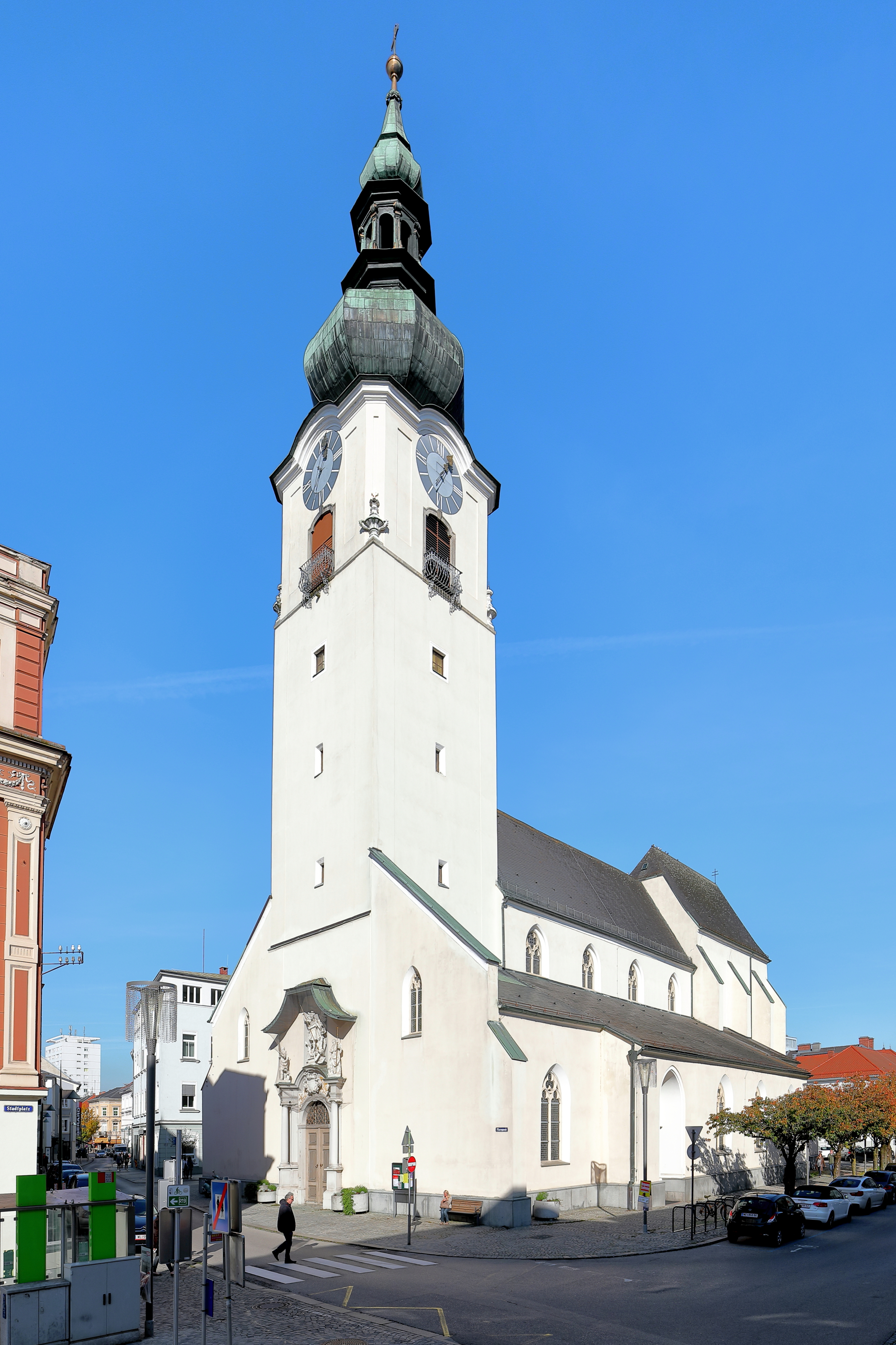 Südwestansicht der Stadtpfarrkirche Hl. Johannes Evangelist in der oberösterreichischen Stadt Wels.Ursprünglich war sie eine romanische Basilika und Ende des 13. Jahrhunderts begann ein gotische Umbau und Erweiterung. In der ersten Hälfte des 18. Jahrhundert erfolgte eine Turmerhöung und das barocke Westportal wurde errichtet. Anlässlich dem 1000-jährigen urkundlichen Bestehen der Kirche, wurde sie 1888 bis 1890 erneuert und umgebaut. Bei der Restaurierung 1958 wurden diese Veränderungen teilweise rückgängig gemacht.